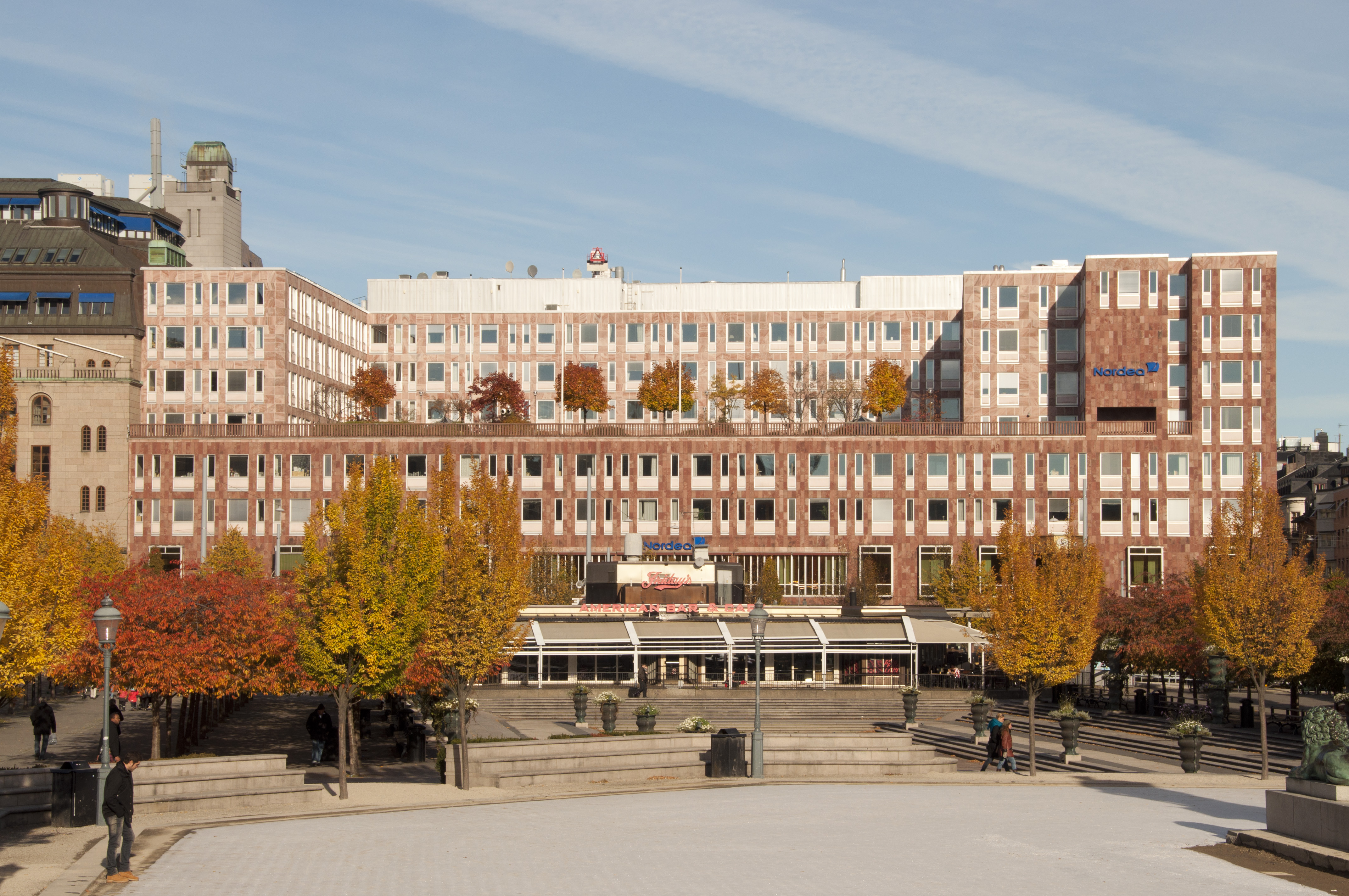 PK-huset